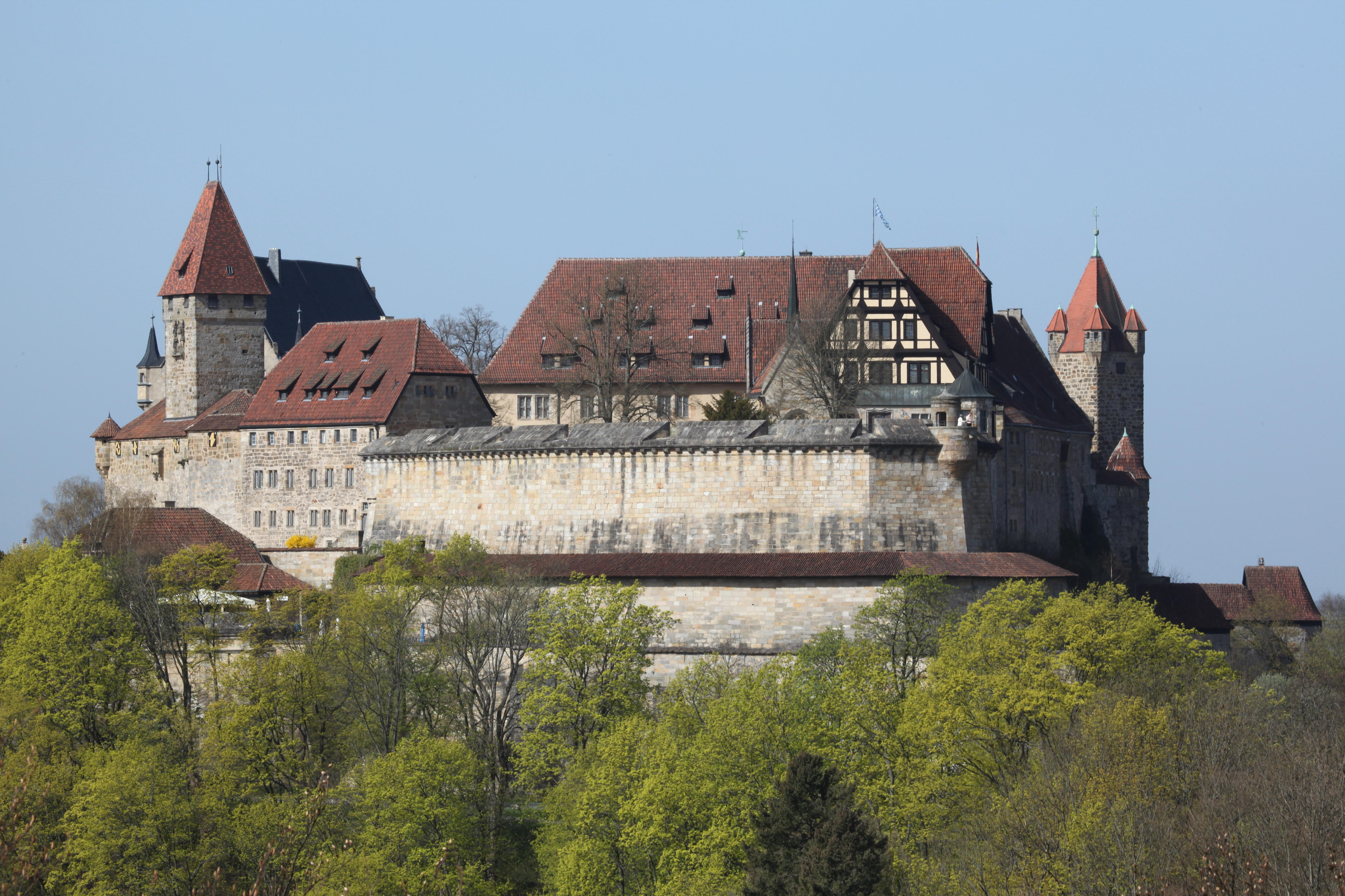 Veste Coburg, Ostansicht